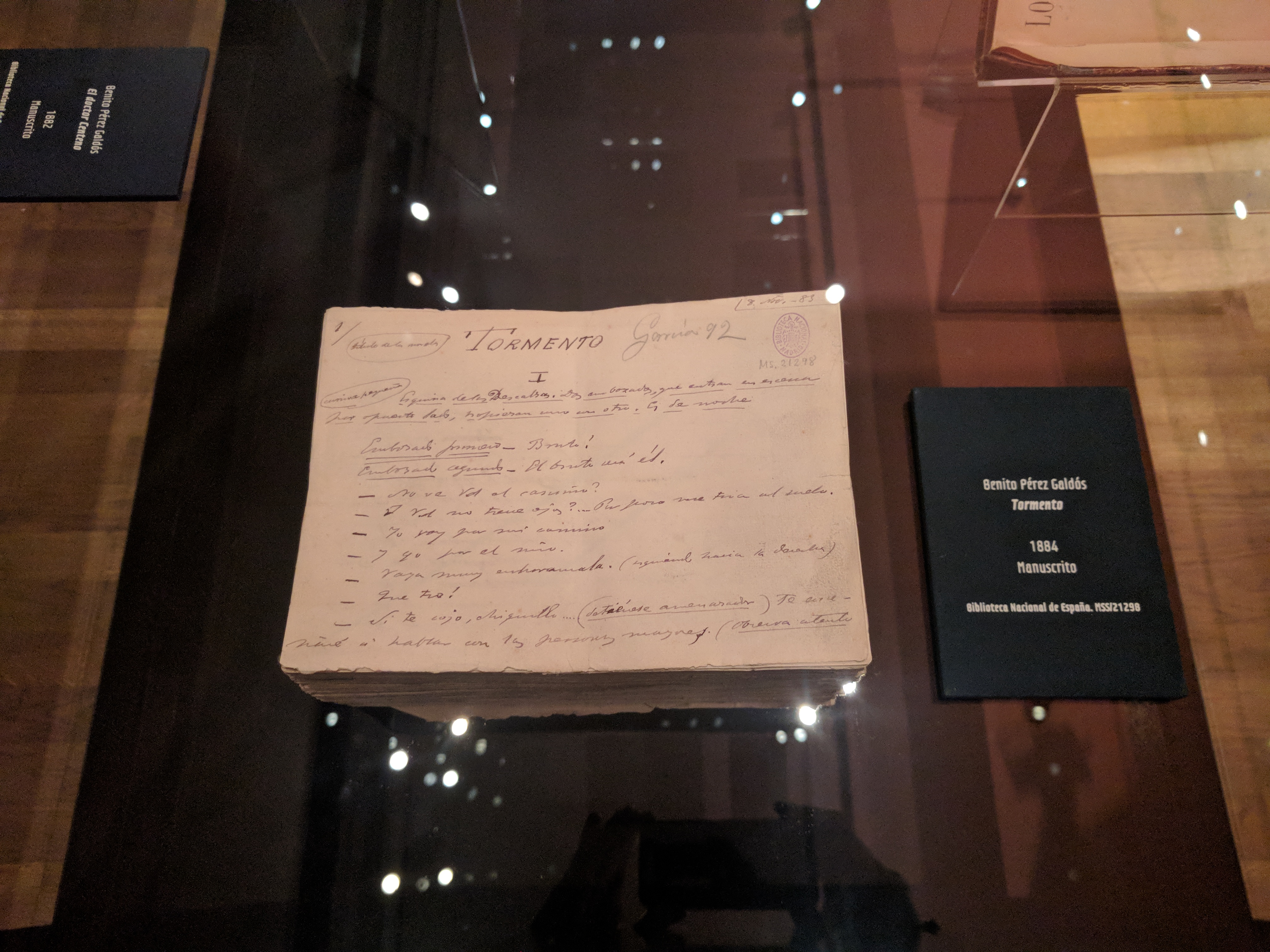 Manuscrito de Tormento de Benito Pérez Galdós, 1884. Biblioteca Nacional de España.